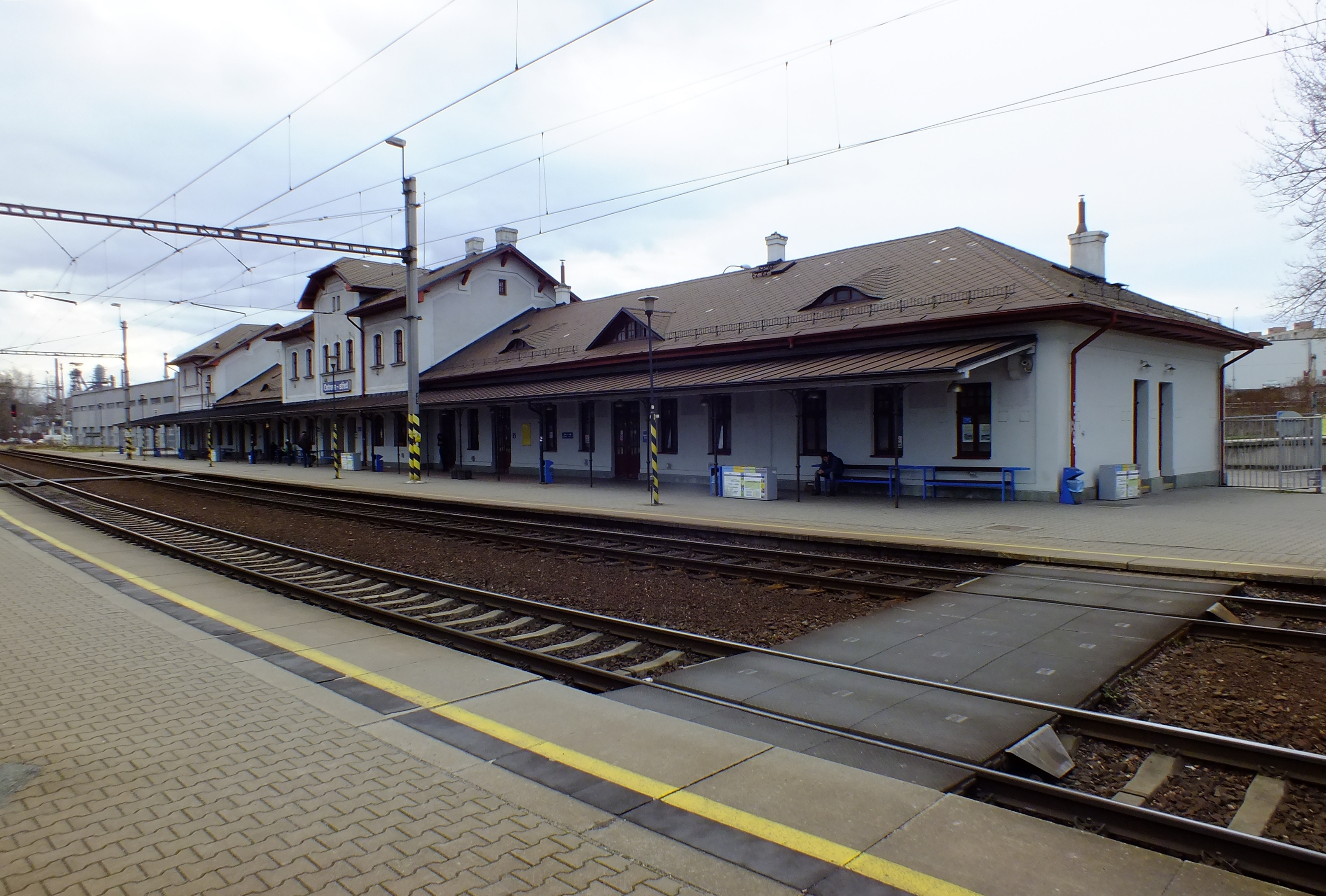 Železniční stanice Ostrava střed